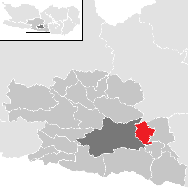 Bezirk Villach-Land